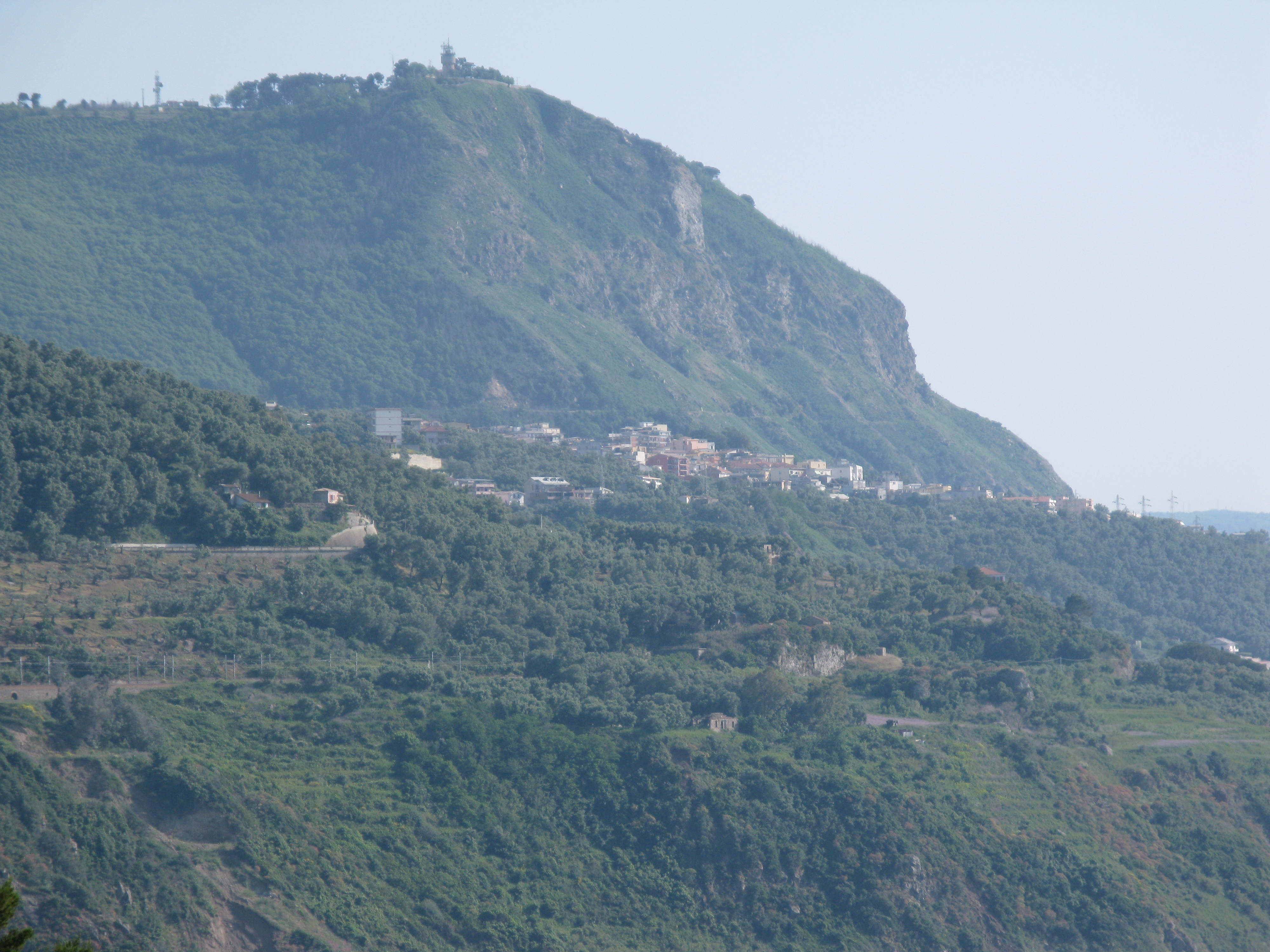 Monte Sant'Elia